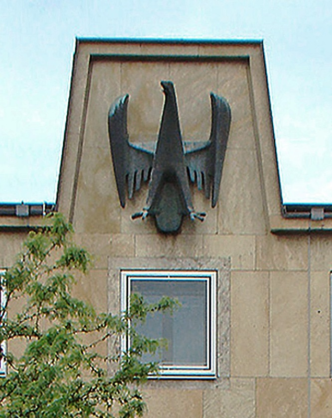 Fassade des Südflügels vom Rathaus-Anbau in Heilbronn